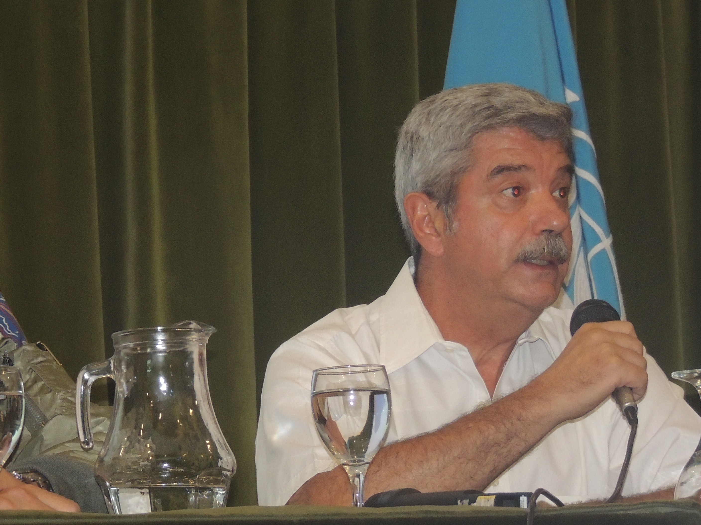 Hector "Pipi" Sanchez durante una charla en la Universidad Kennedy